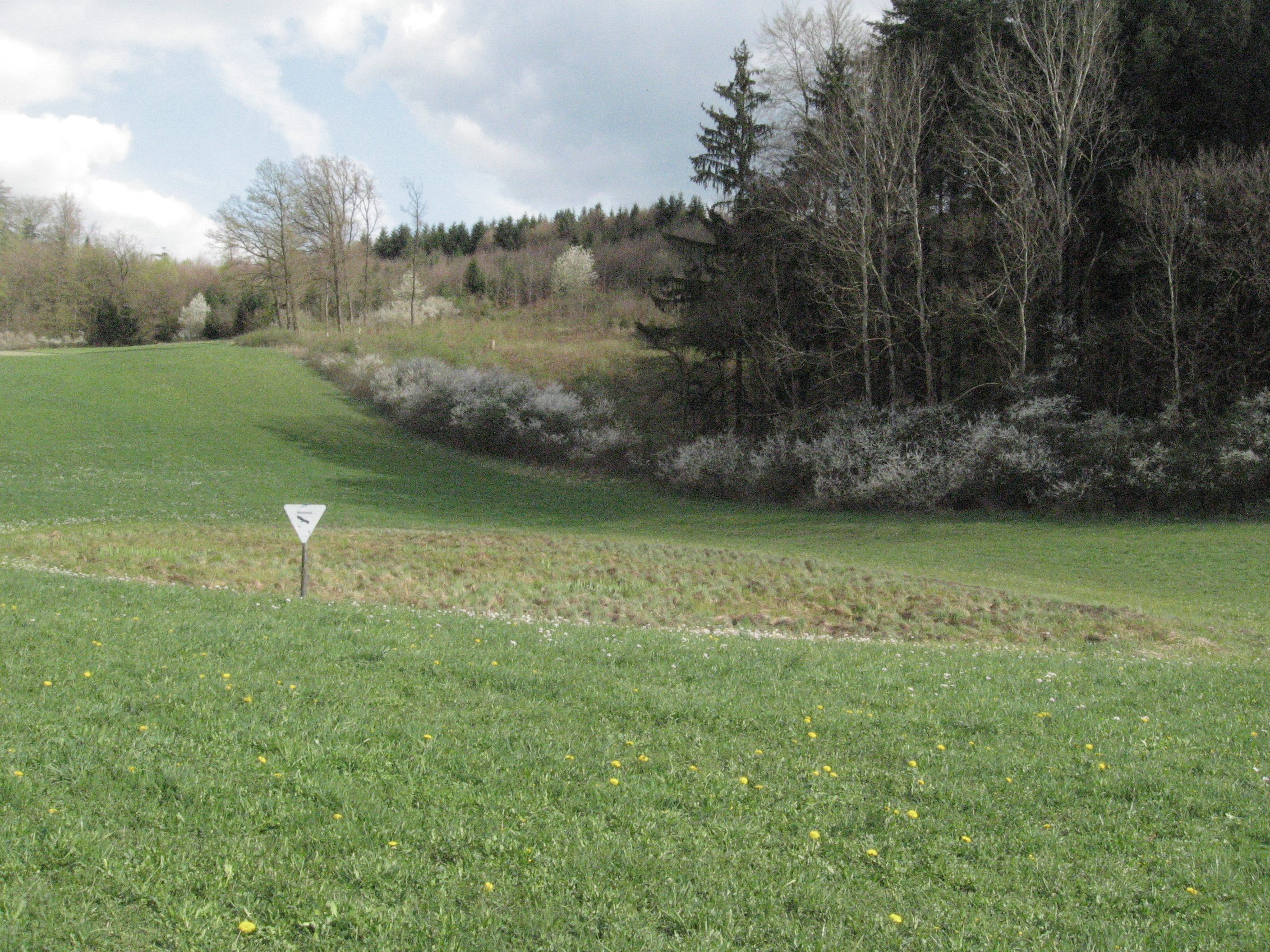 Feuchtgebiet Buchenschnäue etwa 650 m E des Obersontheimer Neuhofs am Fuß des Hangwaldes Buchenschnab (lokaler Name, auf Karten: Buchenschnäue). Es liegt am oberen Ende der Talbildung eines kleinen linken Zuflusses des Nesselbachs im Gipskeuper. Am rechten Bildrand wurde augenscheinlich eine Entwässerungsrinne künstlich geschaffen..